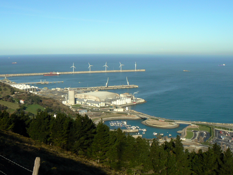 Puerto de Bilbao, Punta Lucero (Zierbena)